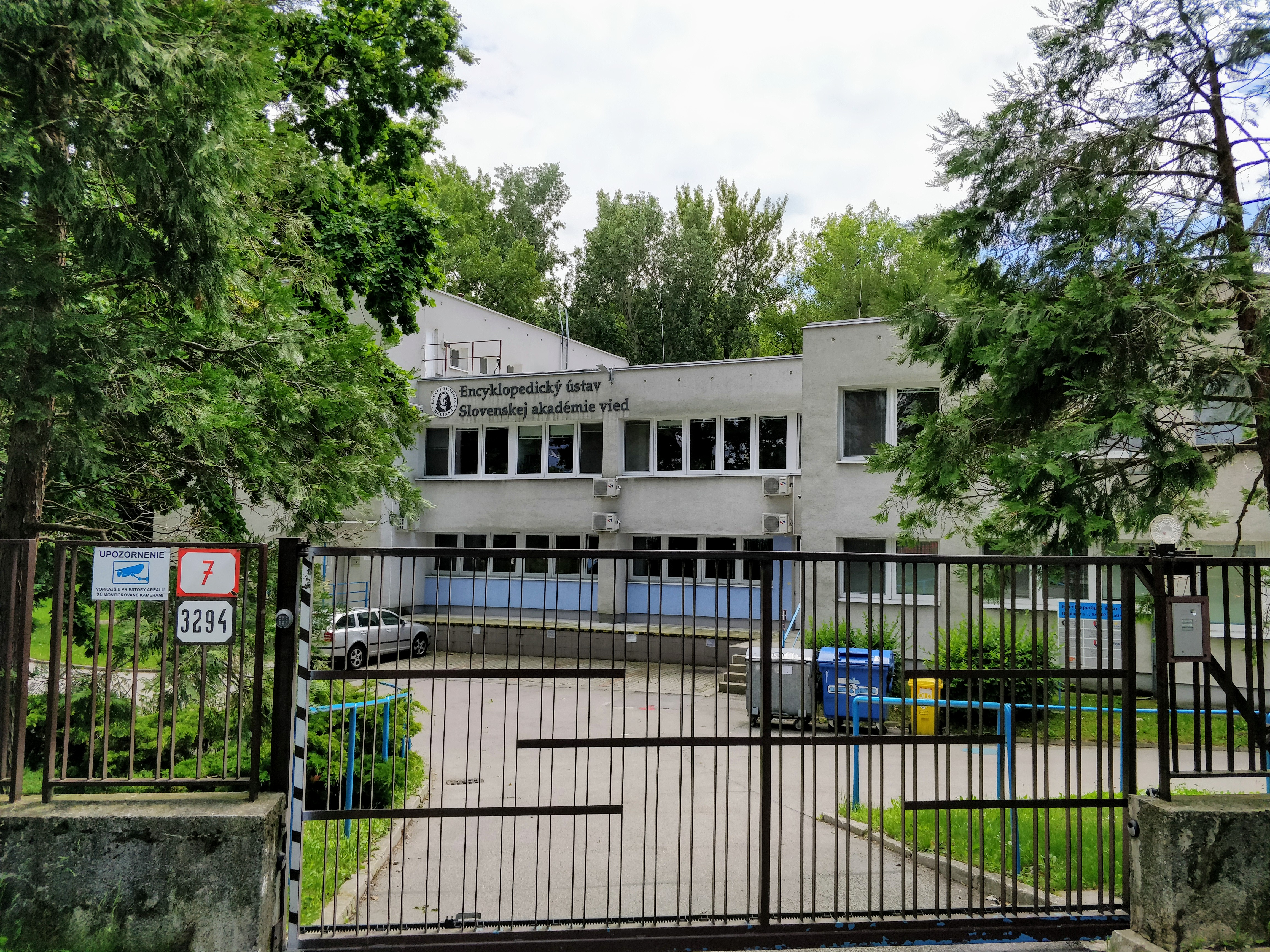 Bradáčova 7, Bratislava